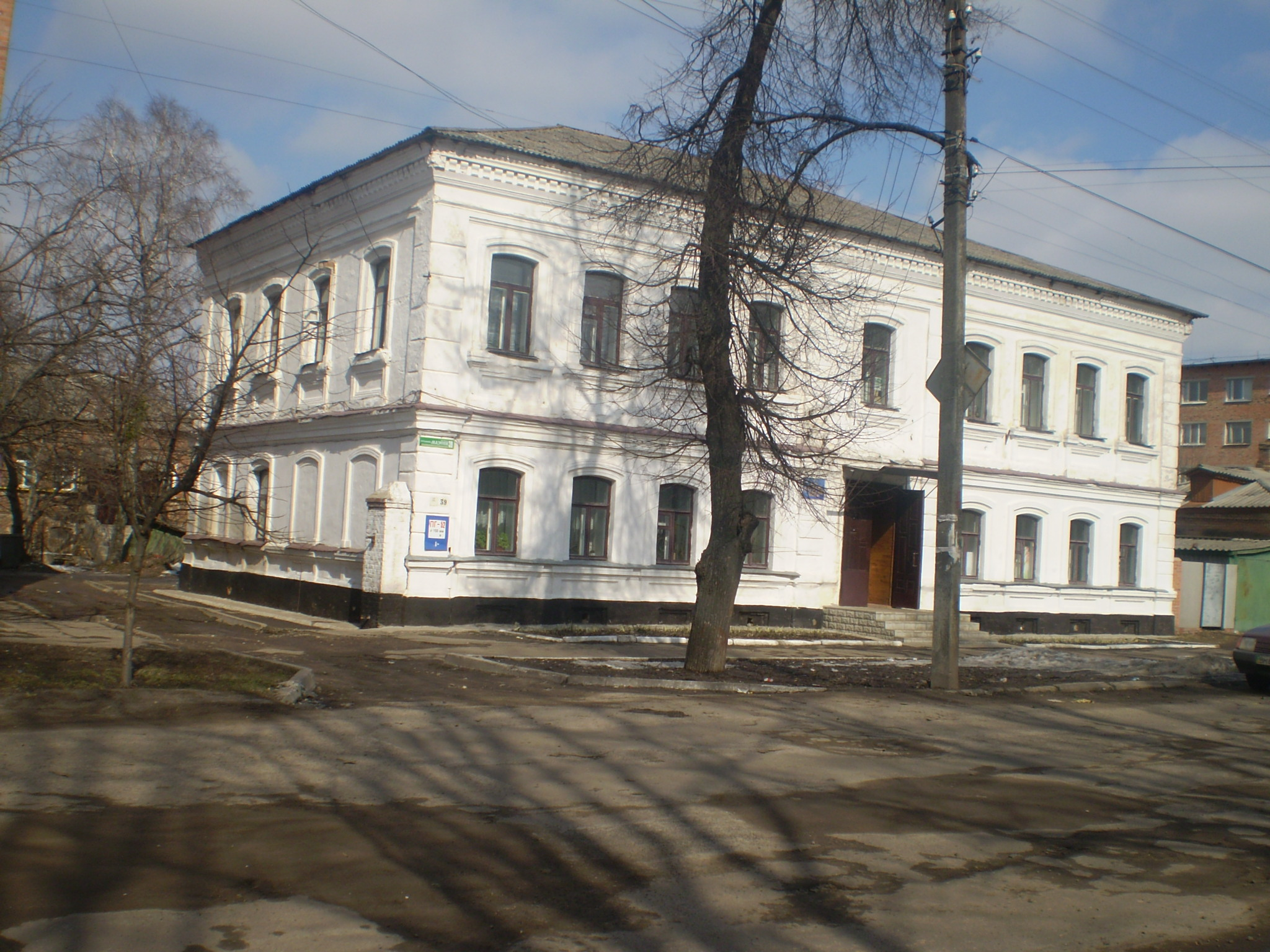 Архітектурна пам'ятка середини 19 століття